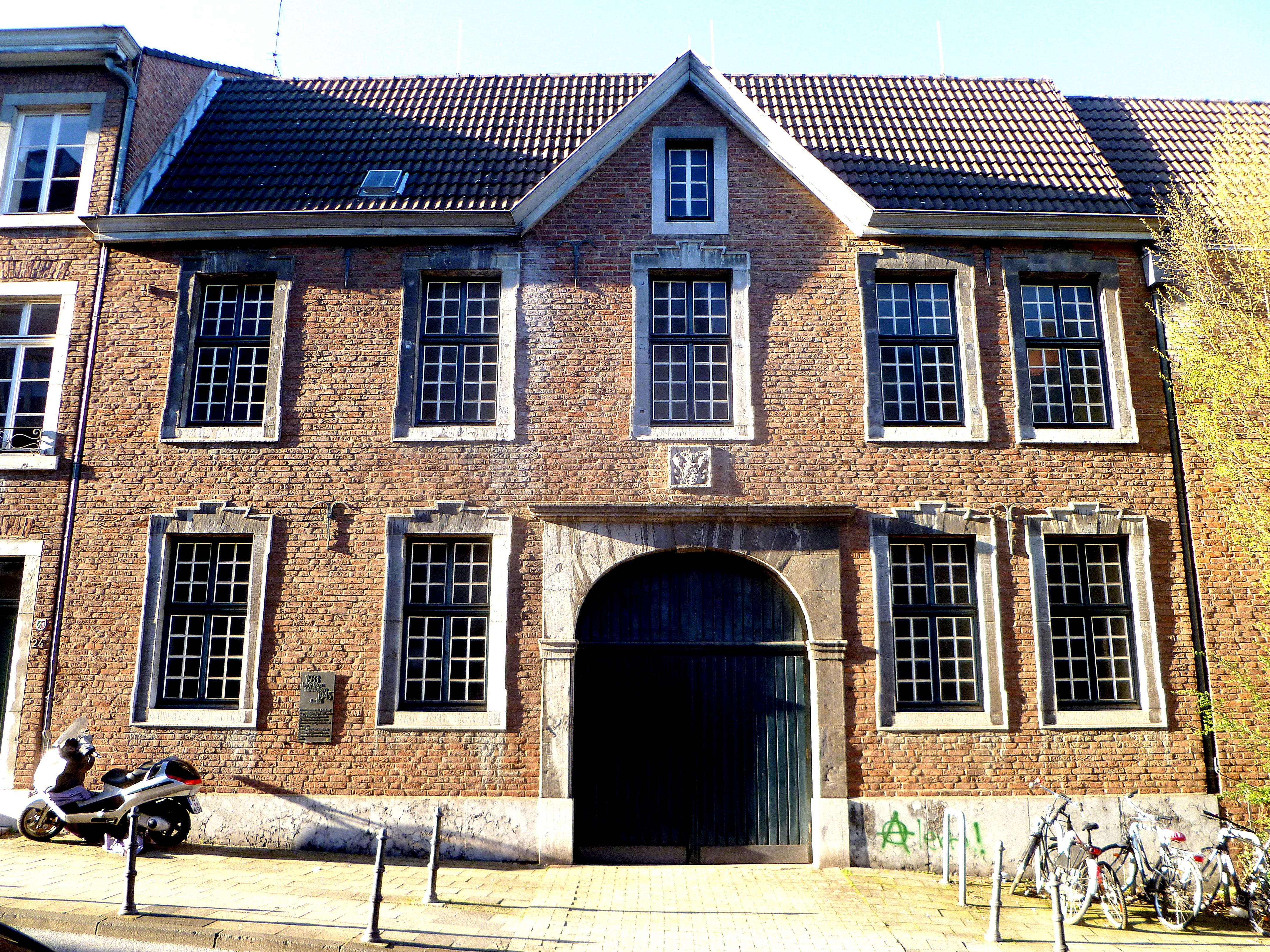 Aachen - Königstraße 22, Gründungsgebäude der Tuchfabrik Kesselkaul & van Gülpen; Baudenkmal in Aachen